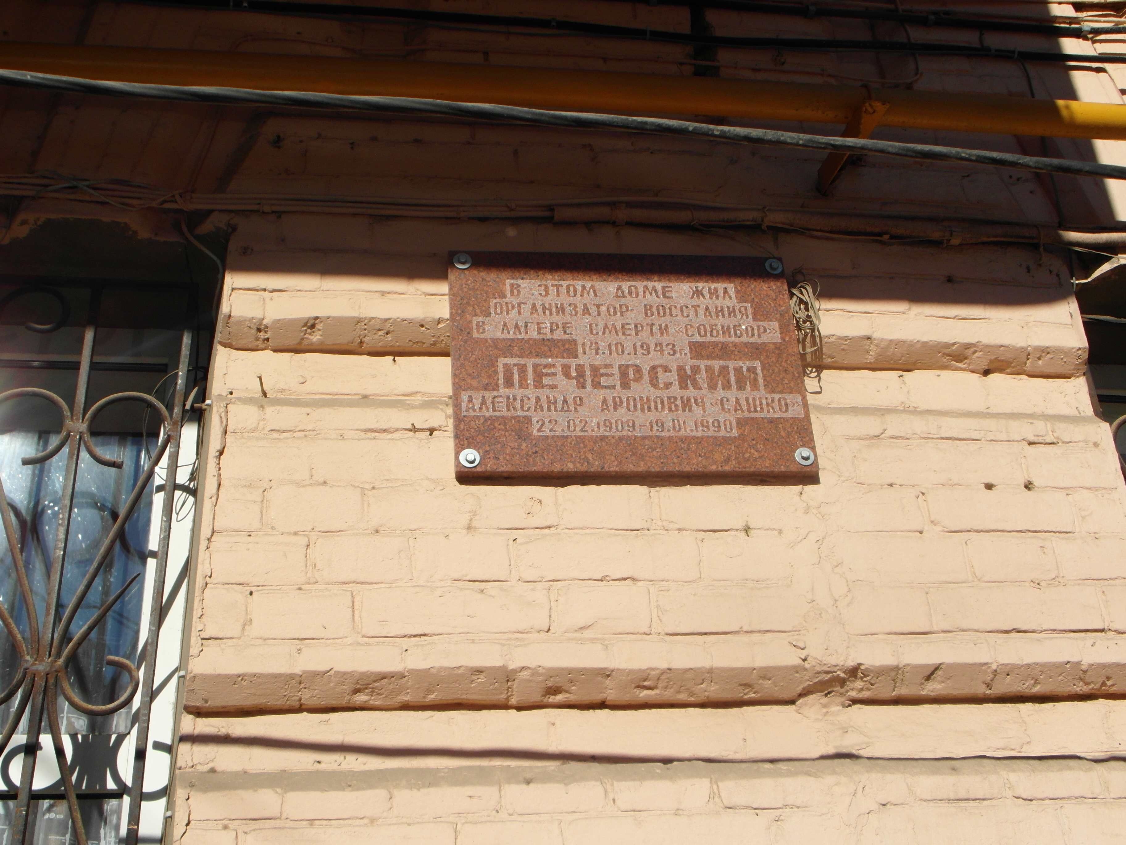 Мемориальная доска на доме, где жил Александр Печерский (Ростов-на-Дону, ул. Социалистическая, д. 121)